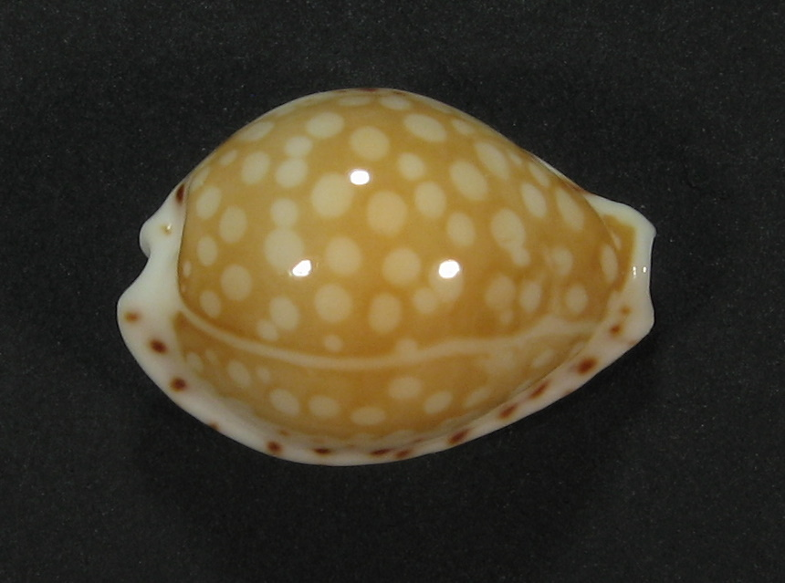 Cribrarula gaskoini (synonym : Cypraea gaskoinii